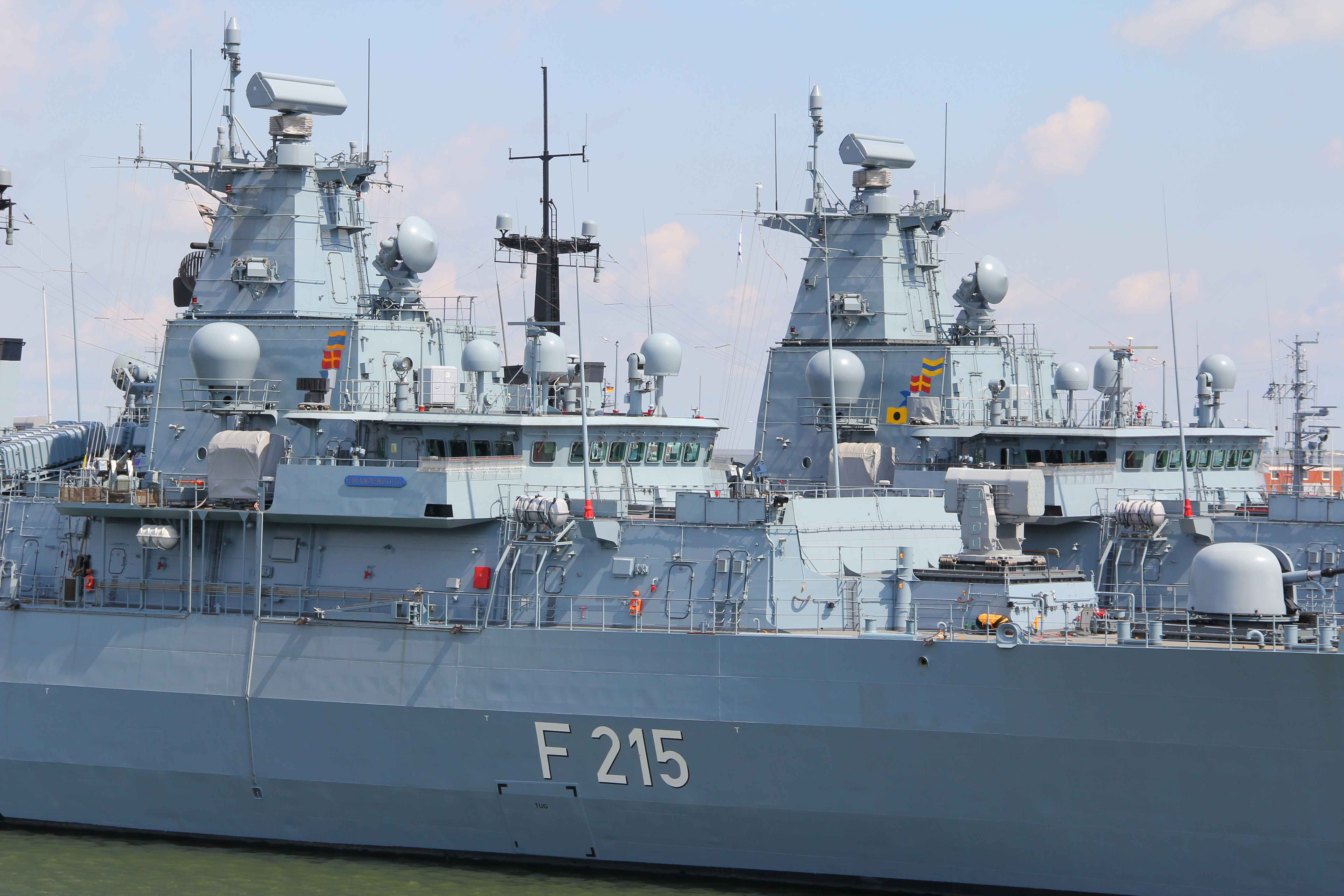 Fregatte Brandenburg, F215